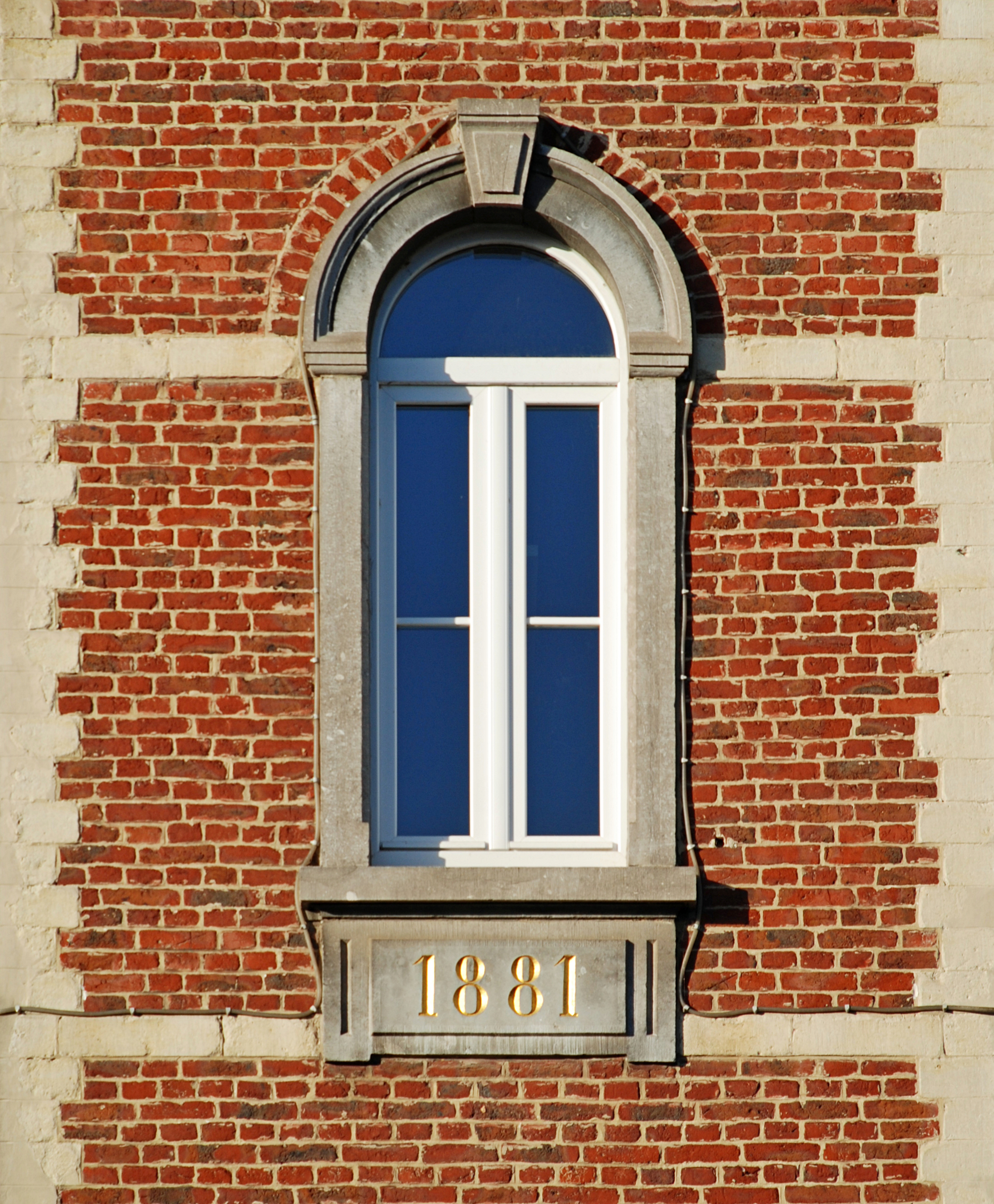 Belgique - Ottignies - maison communale (architecte Émile Coulon - 1881 - style éclectique)